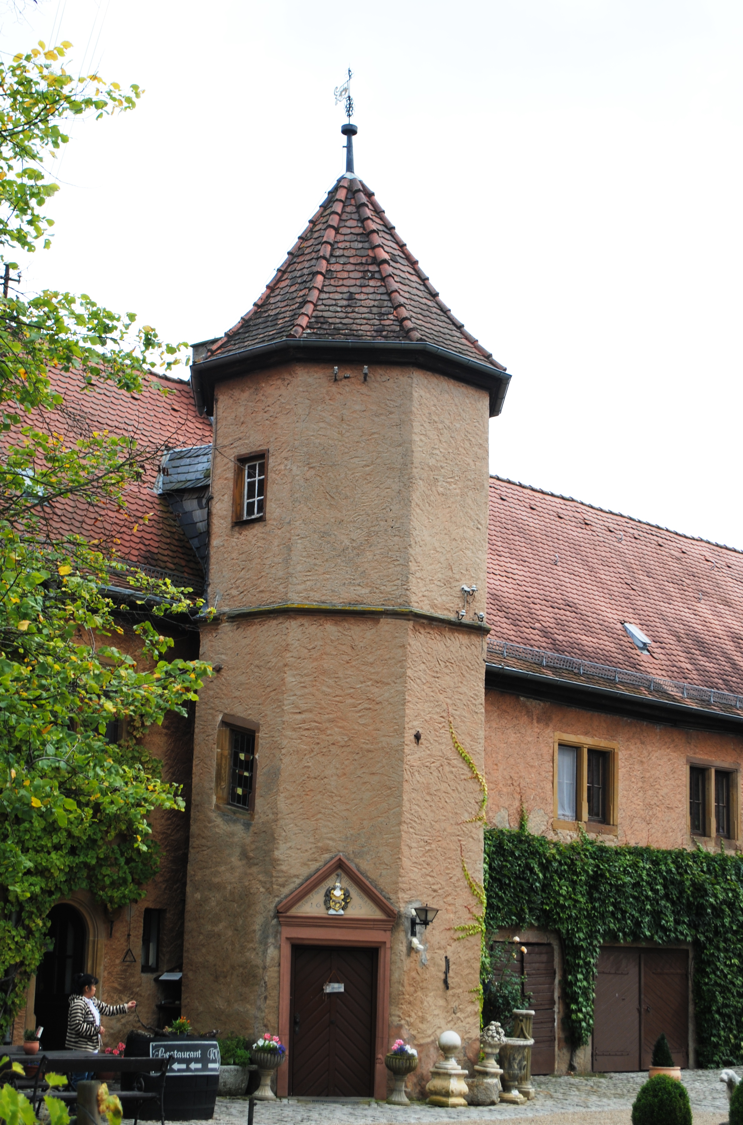 Schloss Neuses am Sand, TreppenturmThis is a photograph of an architectural monument.